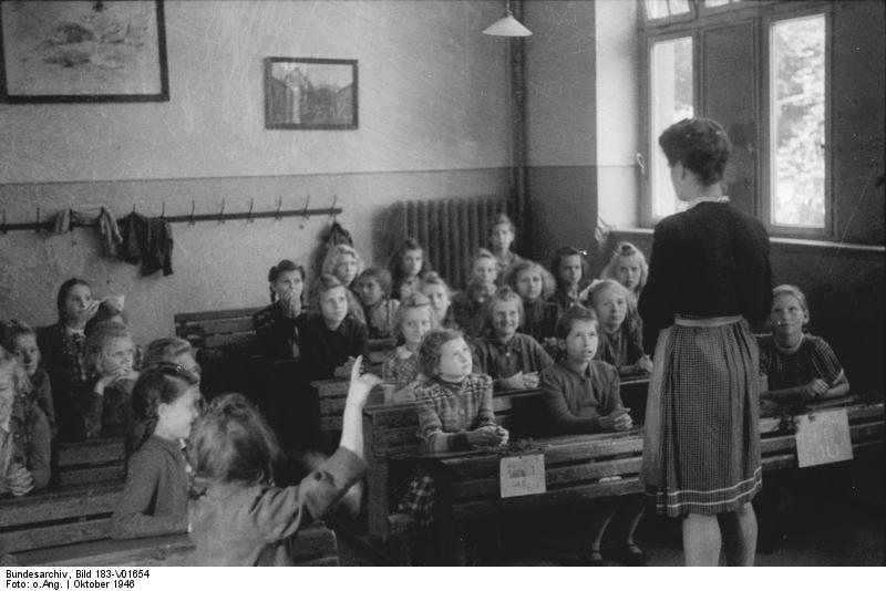 Erfurt, Wahl Vertrauensschülerin ADN-ZB - SNB Die Schule nach dem II. Weltkrieg im antifaschistischen demokratischen Deutschland. UBz: Die Mädchenklasse einer Erfurter Volksschule wählt ihre Vertrauensschülerin. Die Lehrerin nimmt die Wahlvorschläge entgegen. (Aufnahme Oktober 1946) 5050-50